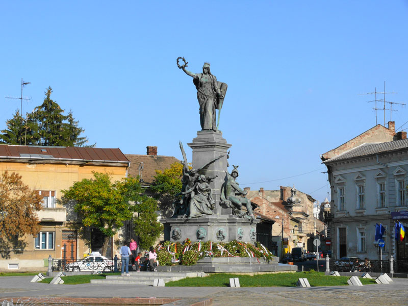 A Szabadság-szobor Aradon